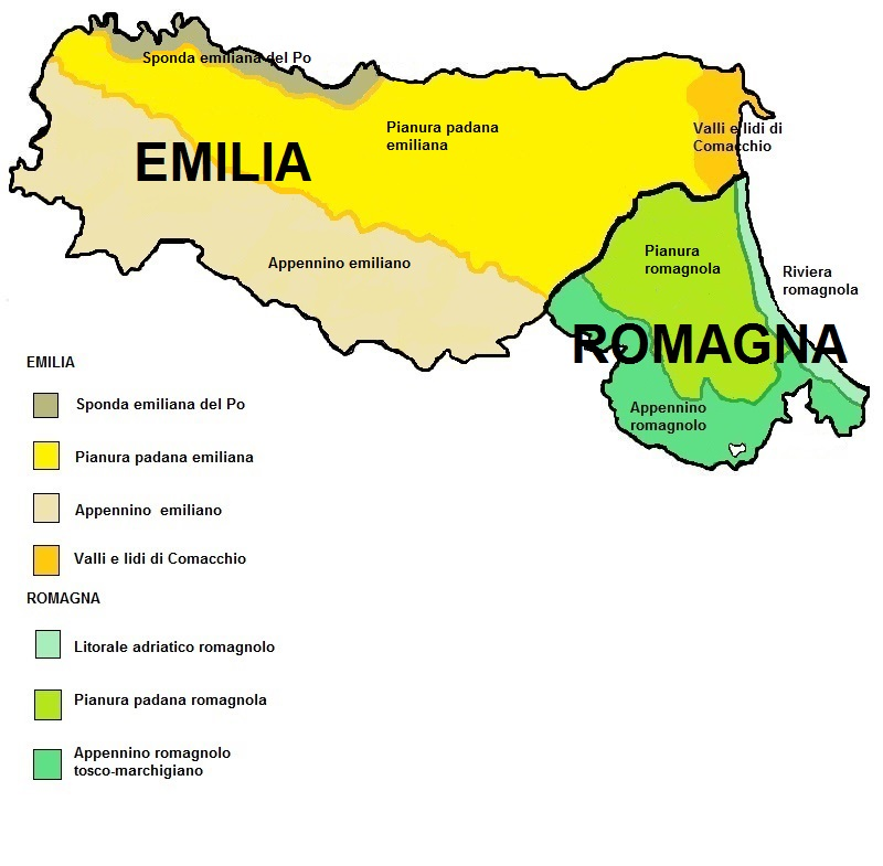 Emilia Romagna - cartina territori